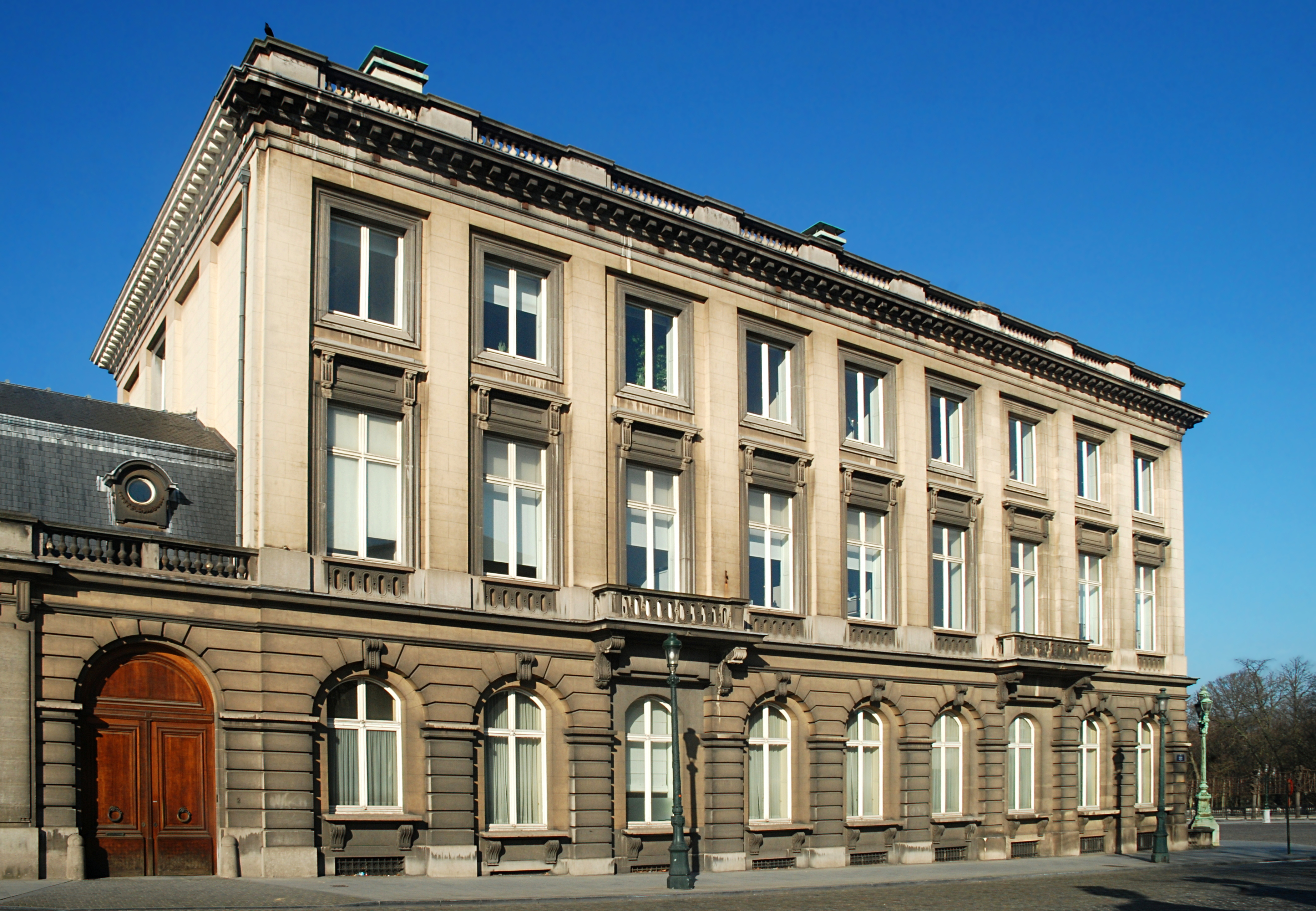 Belgique - Bruxelles - Hôtel de la Liste civile